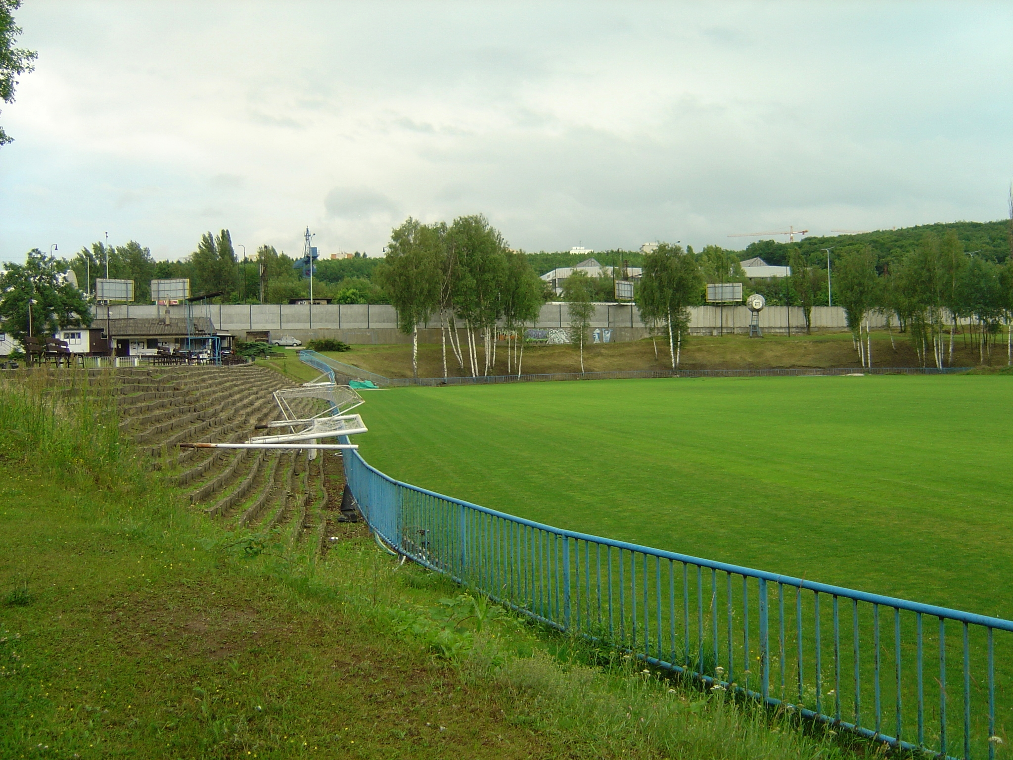 Stadion des tschechischen Fußballvereins SK Sparta Krč